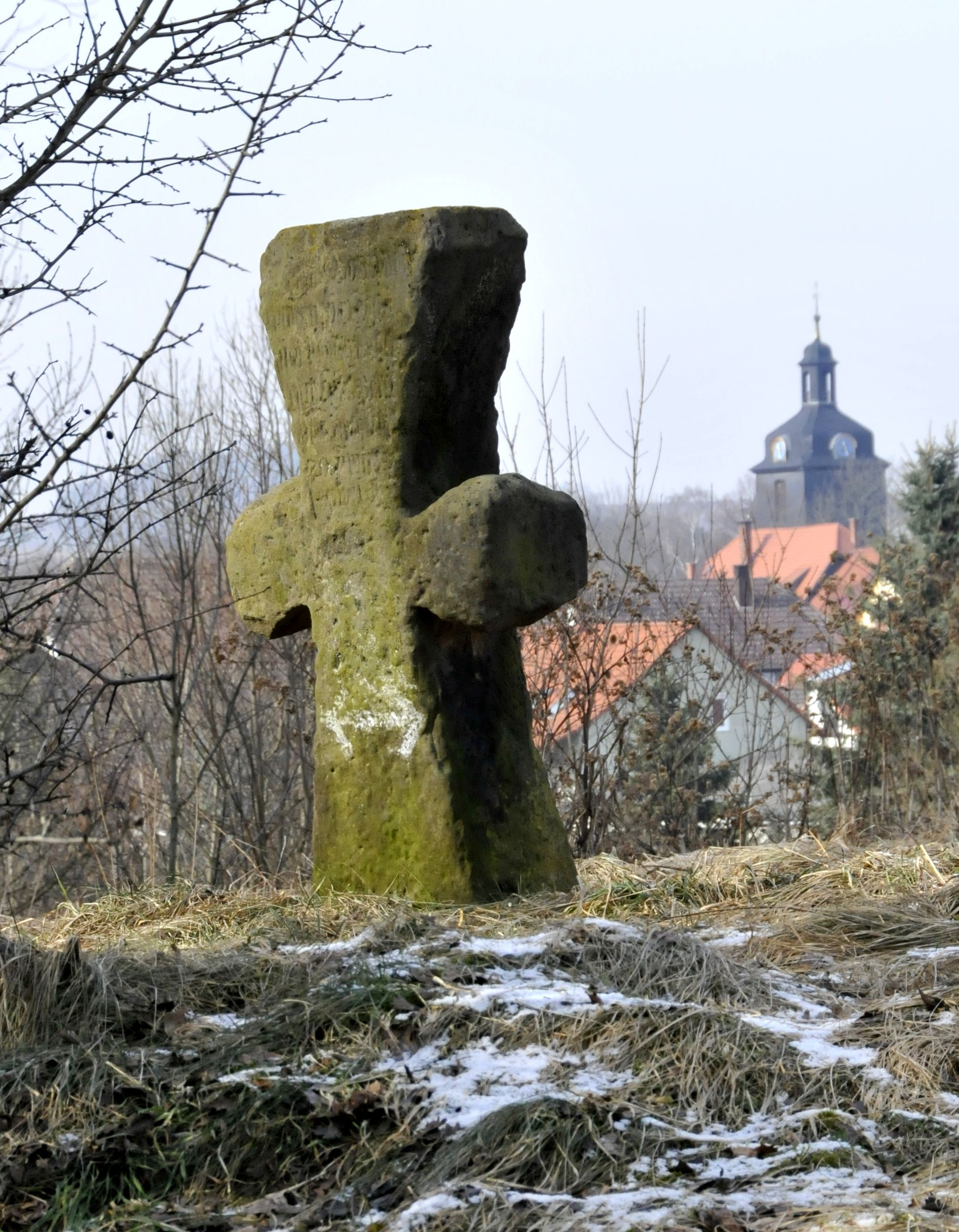 Ingersleben, Steinkreuz